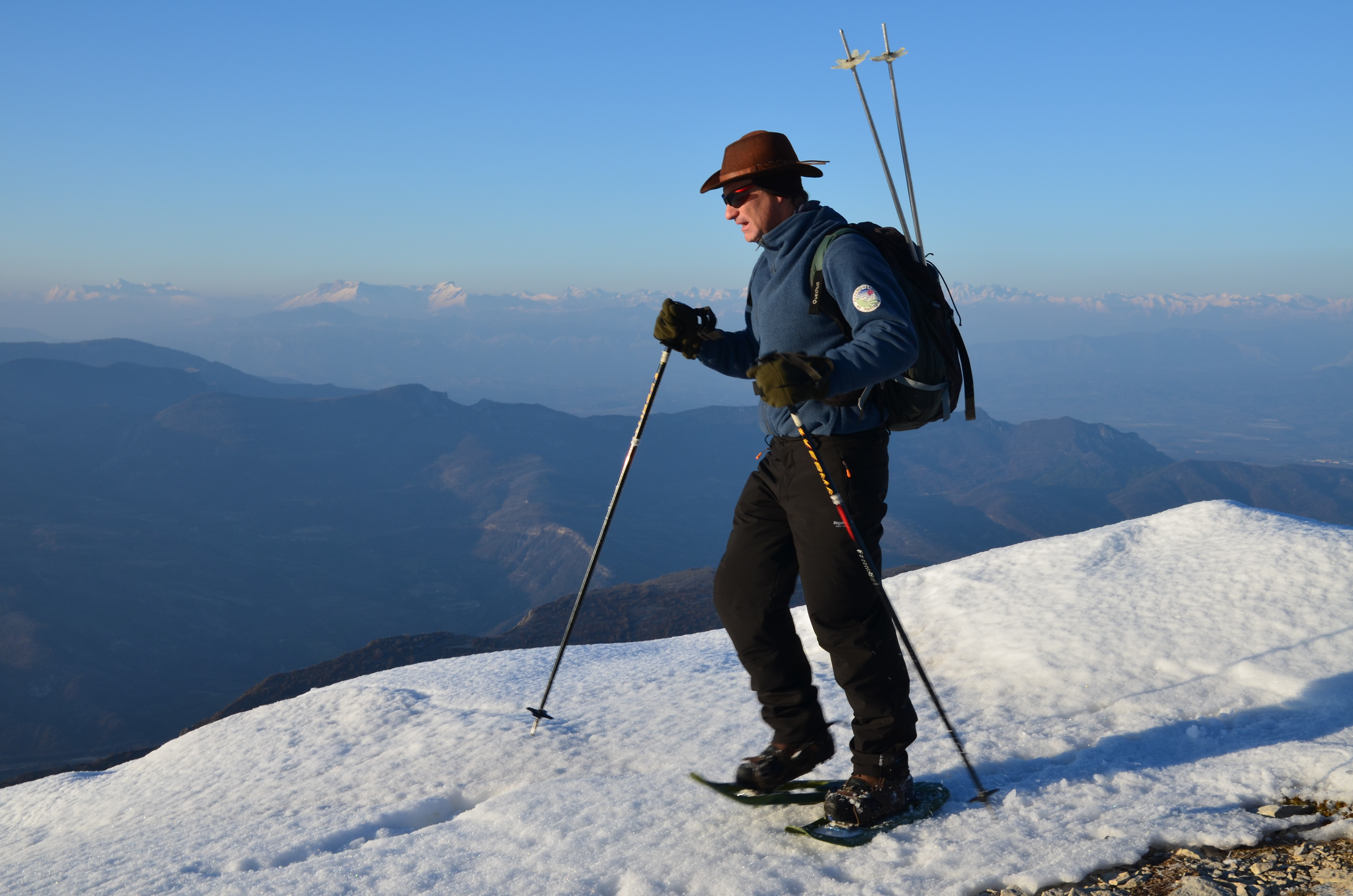 Mathieu Boogaerts, en ski raquette, dans la montagne de Lure